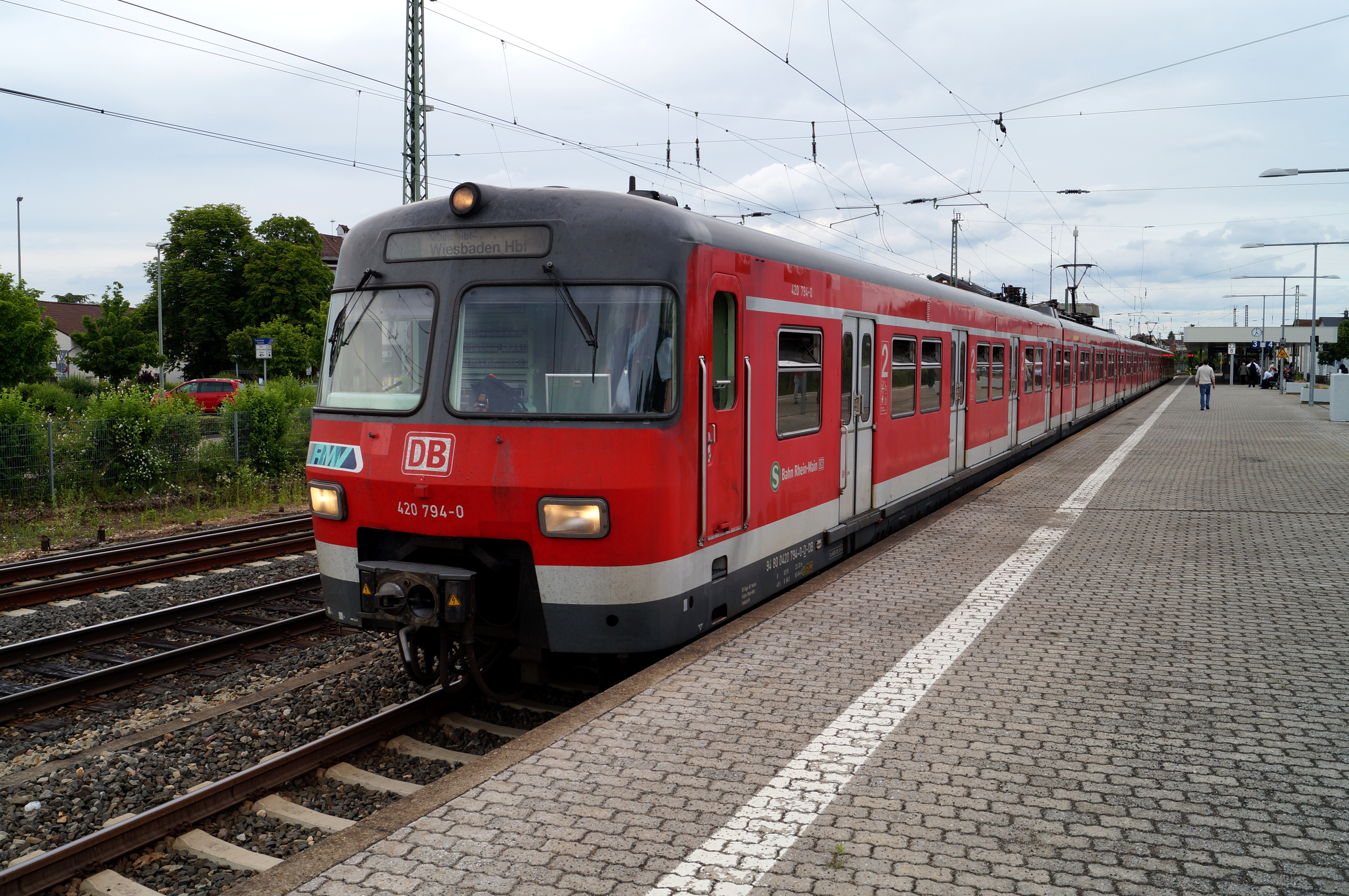 S8 der S-Bahn Rhein-Main mit Triebwagen der DB-Baureihe 420 im Bahnhof Kelsterbach